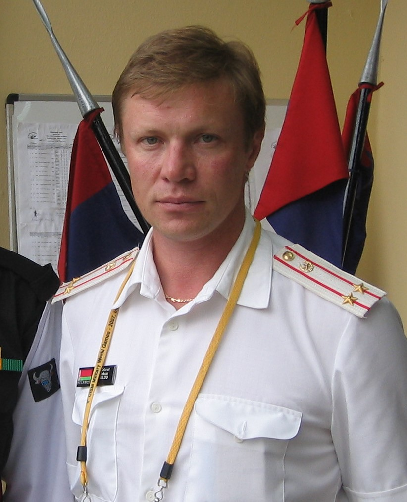 Послов Алексей